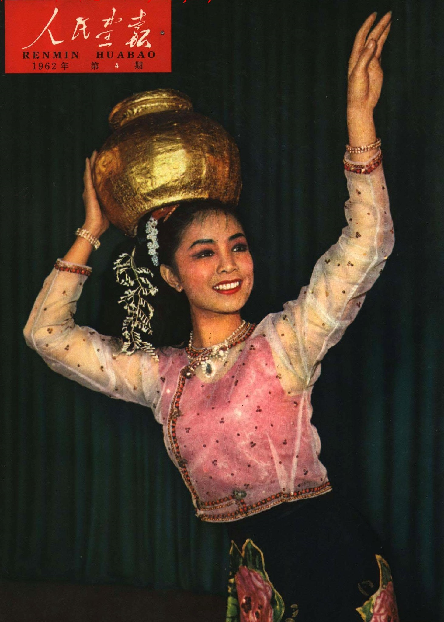 1962-04 1962年 东方歌舞团 共饮一江水 演员张均